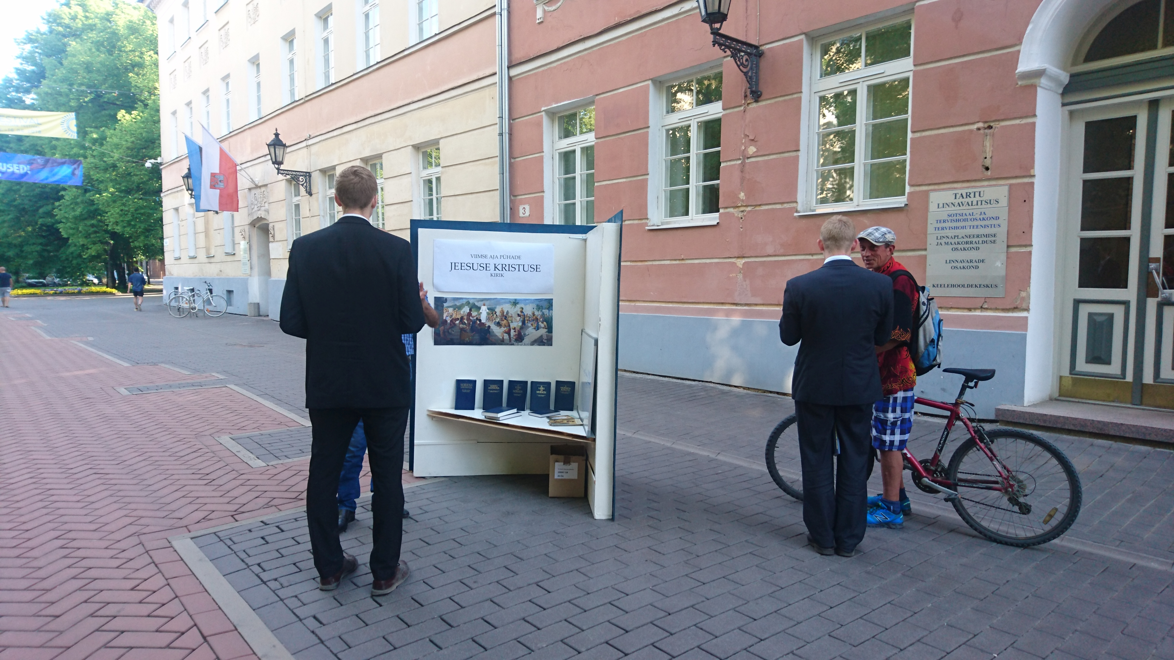 Viimse aja pühade Jeesuse Kristuse kiriku misjonärid jutlustamas Tartus Rüütli tänaval, 26.05.2018.